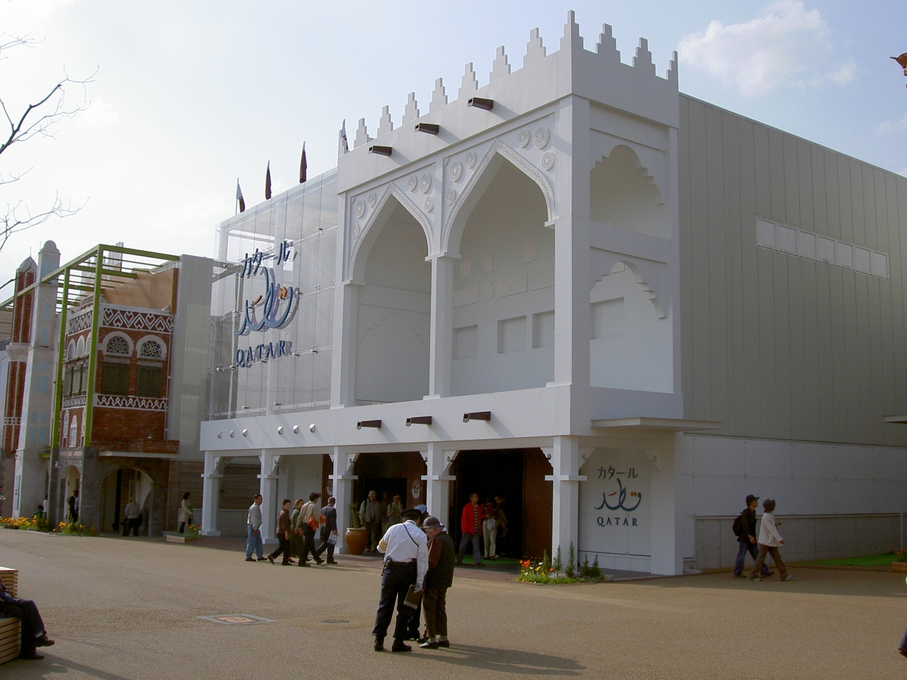 EXPO2005 Qatar pavilion